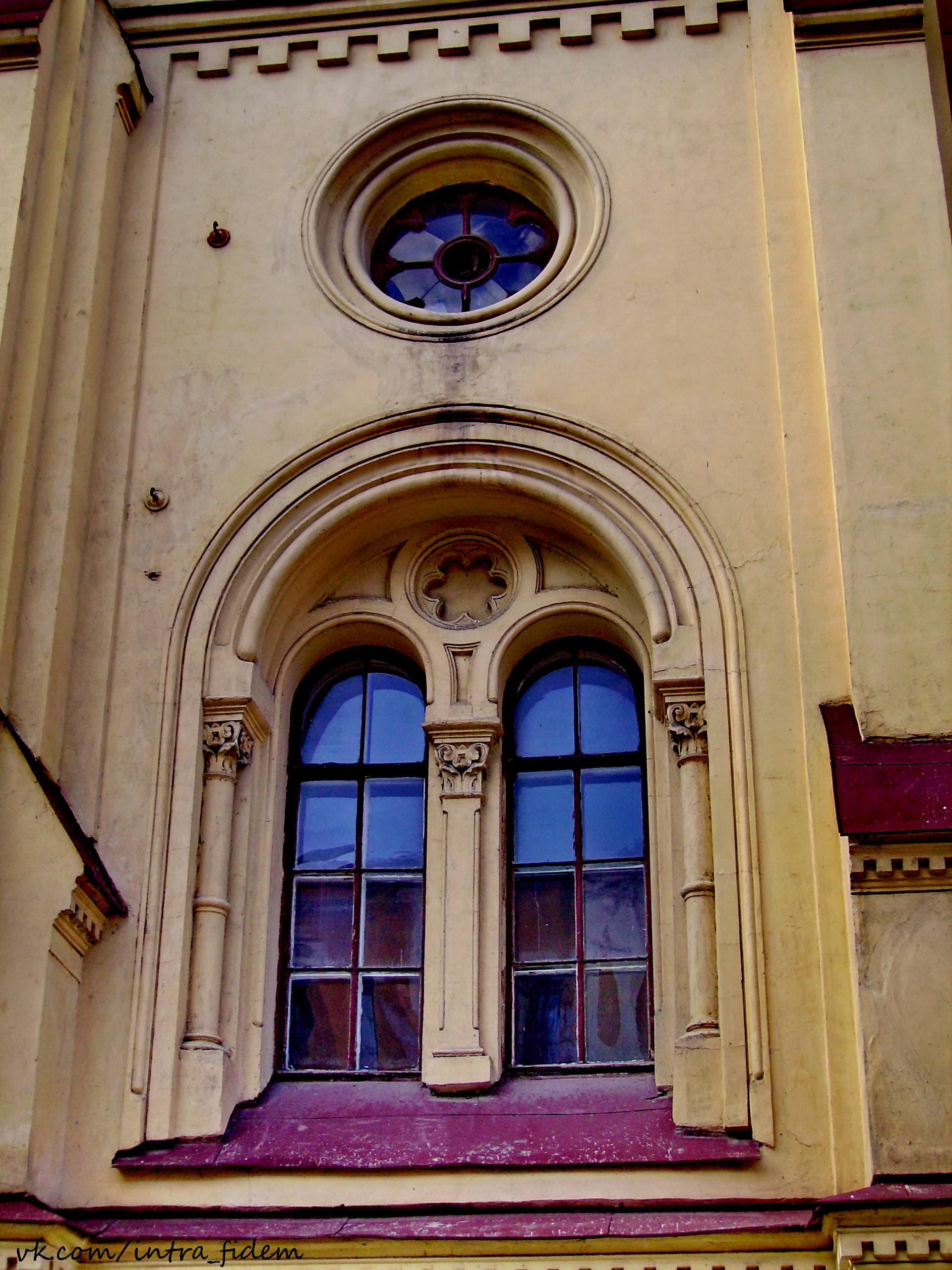 Церковь лютеранско-евангелическая Святой Екатерины (Санкт-Петербург и Лен.область, Санкт-Петербург, Малая Конюшенная улица, 1, 3, Шведский переулок, 3)